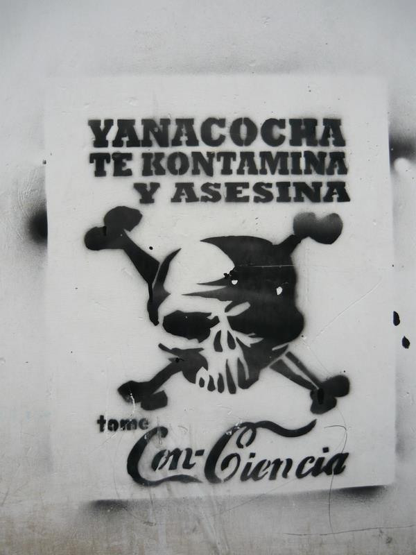 Stencil contra la minera Yanacocha, todo un tema en Cajamarca